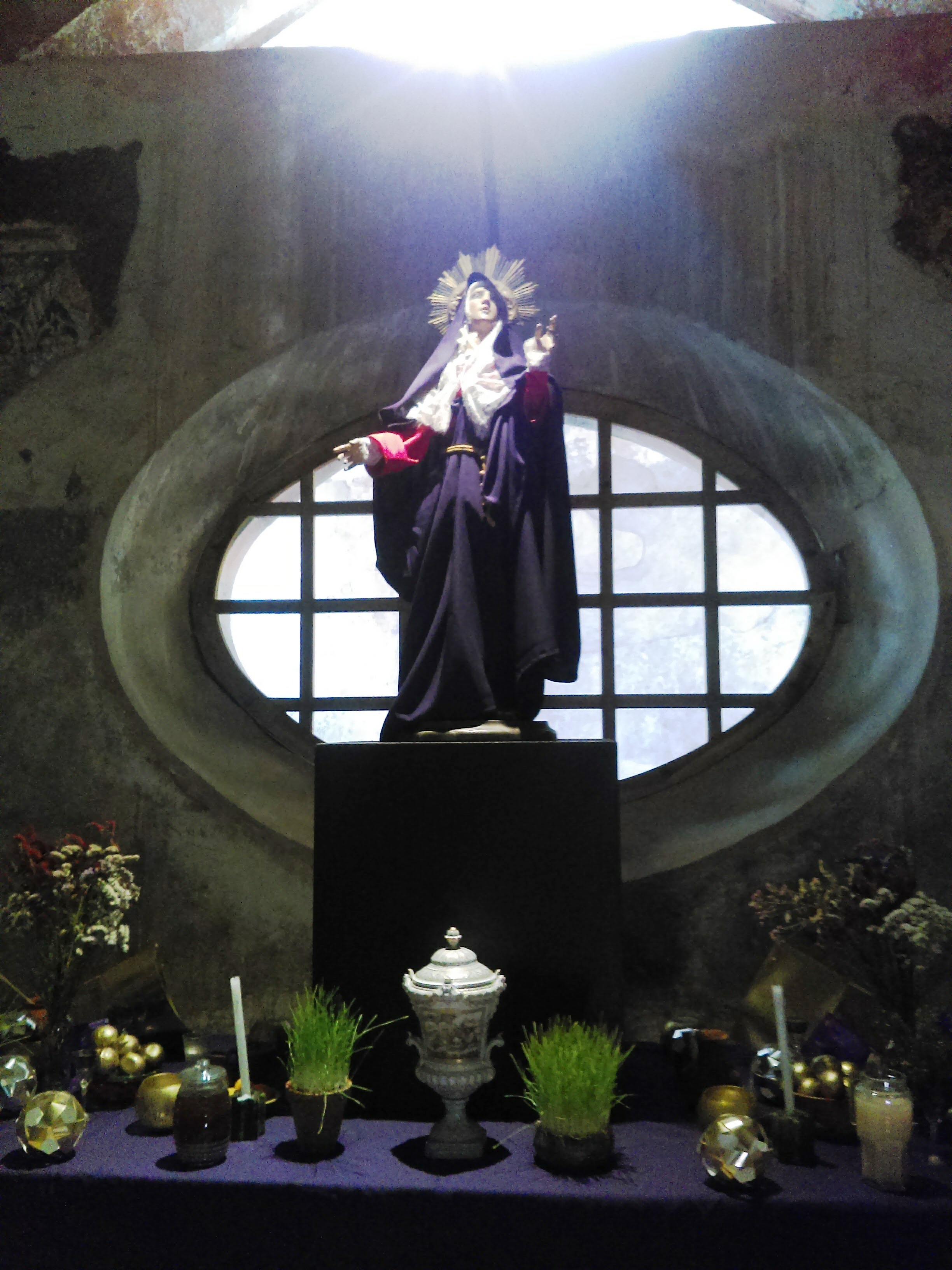 Altar de Dolores en Actopan, Hidalgo, México (2017)